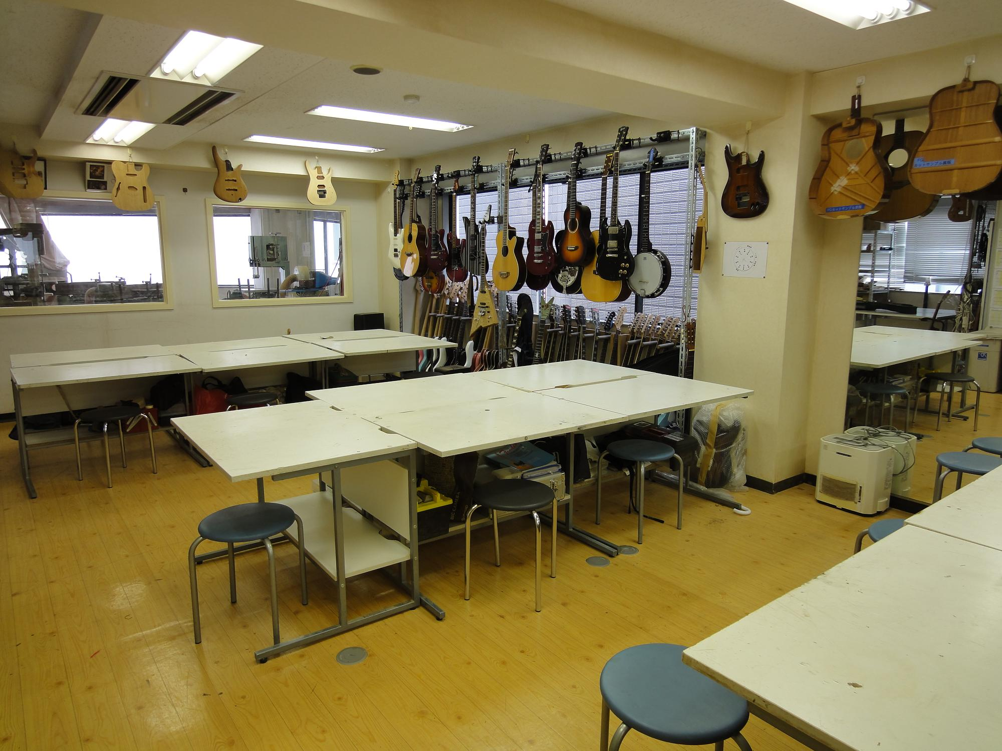 代官山音楽院ギタークラフト＆リペア科工房